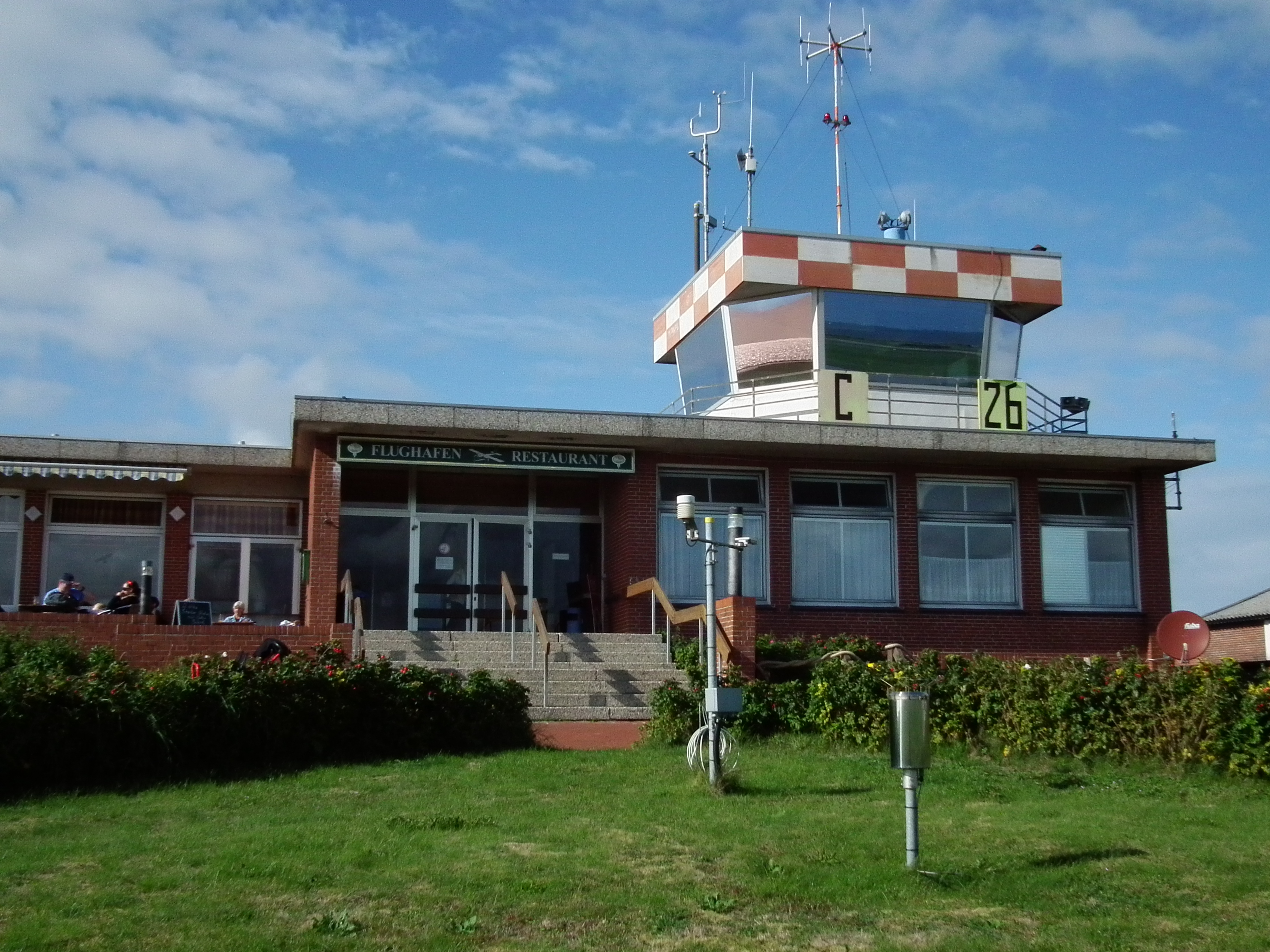 Restaurant und Tower des Flughafens auf der ostfriesischen Nordseeinsel Juist (Niedersachsen, Deutschland)